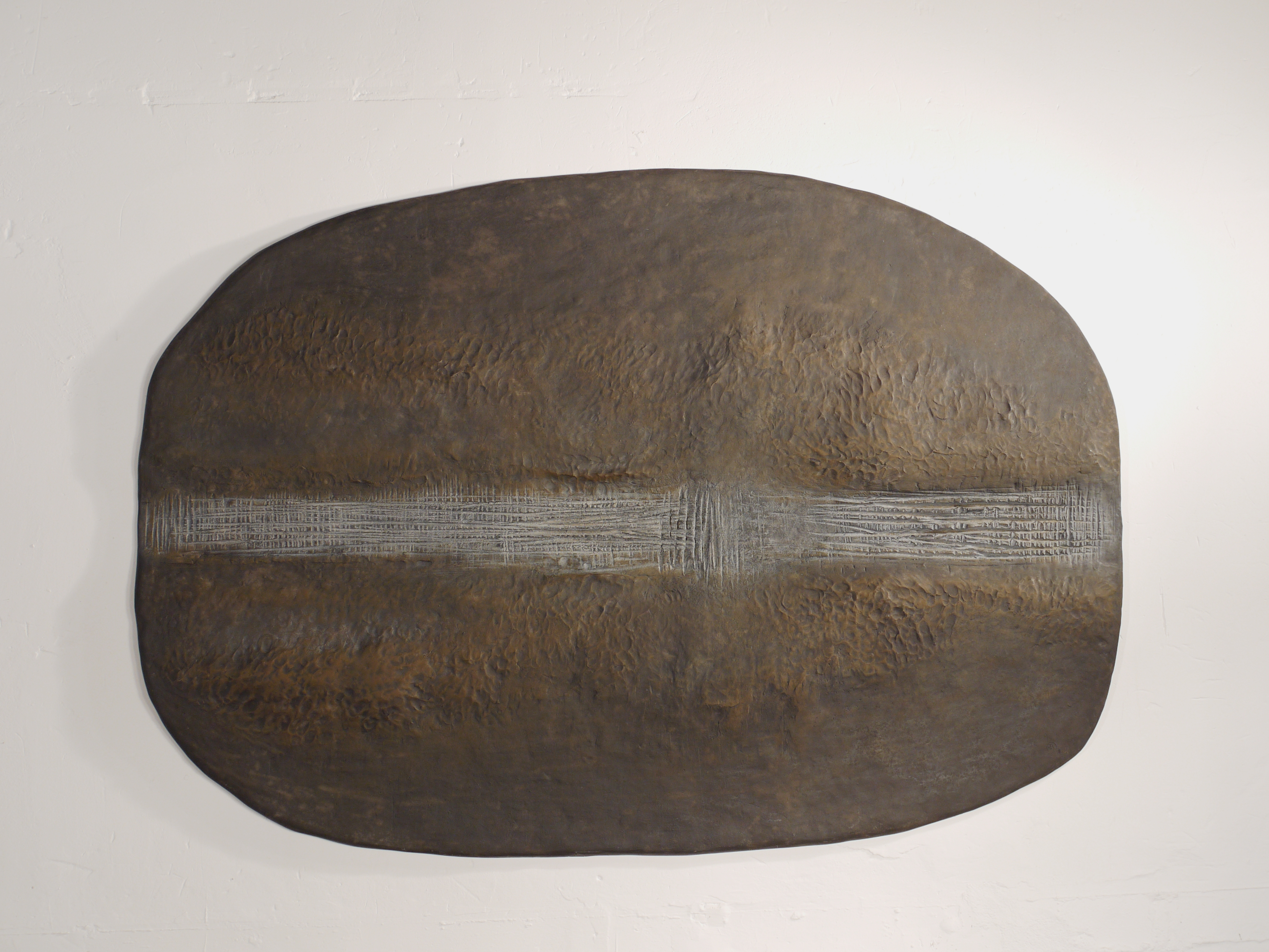 La plaine traversée, 1999, Résine polyester 117 x 167 x 5 cm